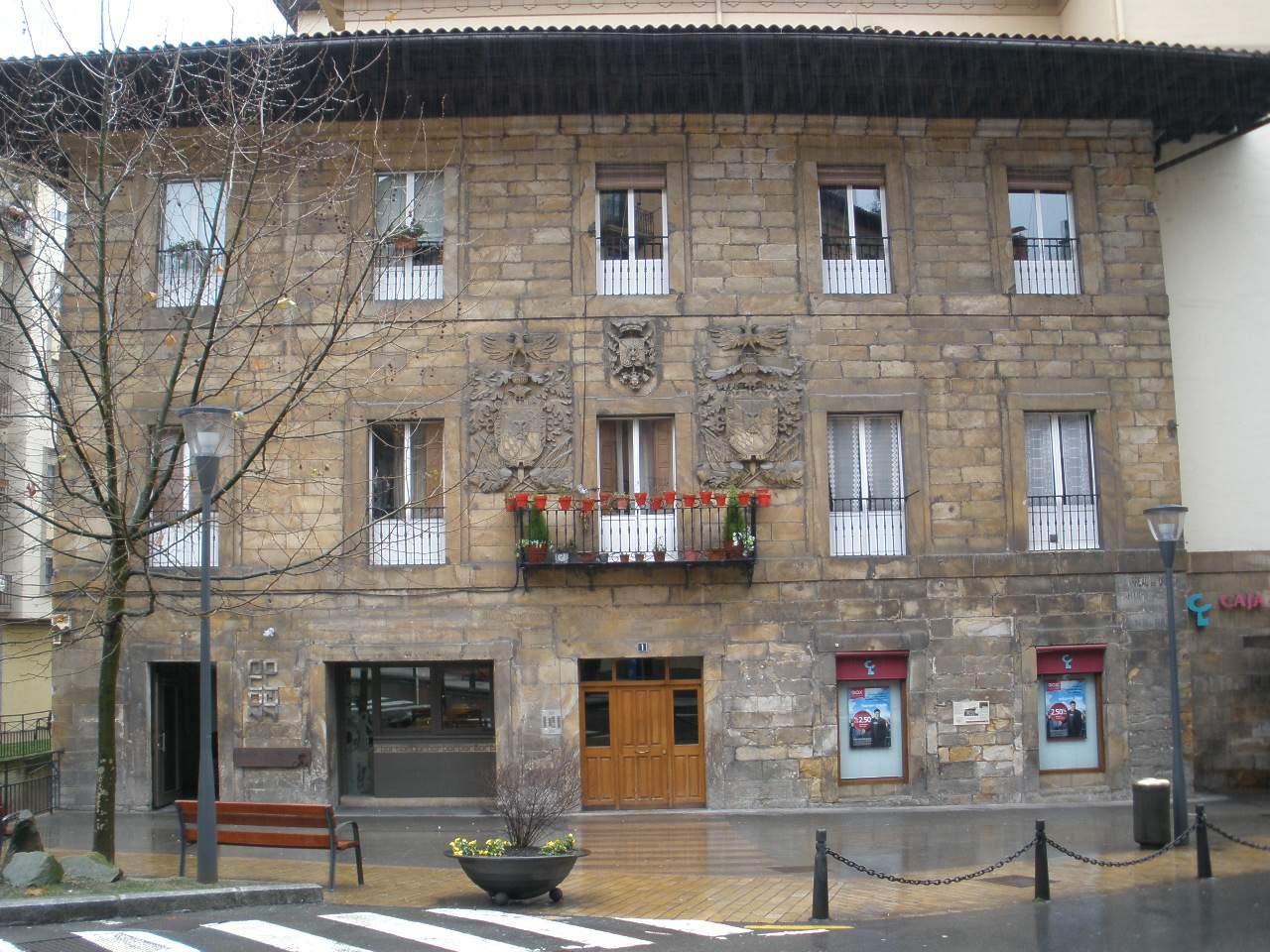 Palacio Areizaga (Urretxu, Gipúzkoa)